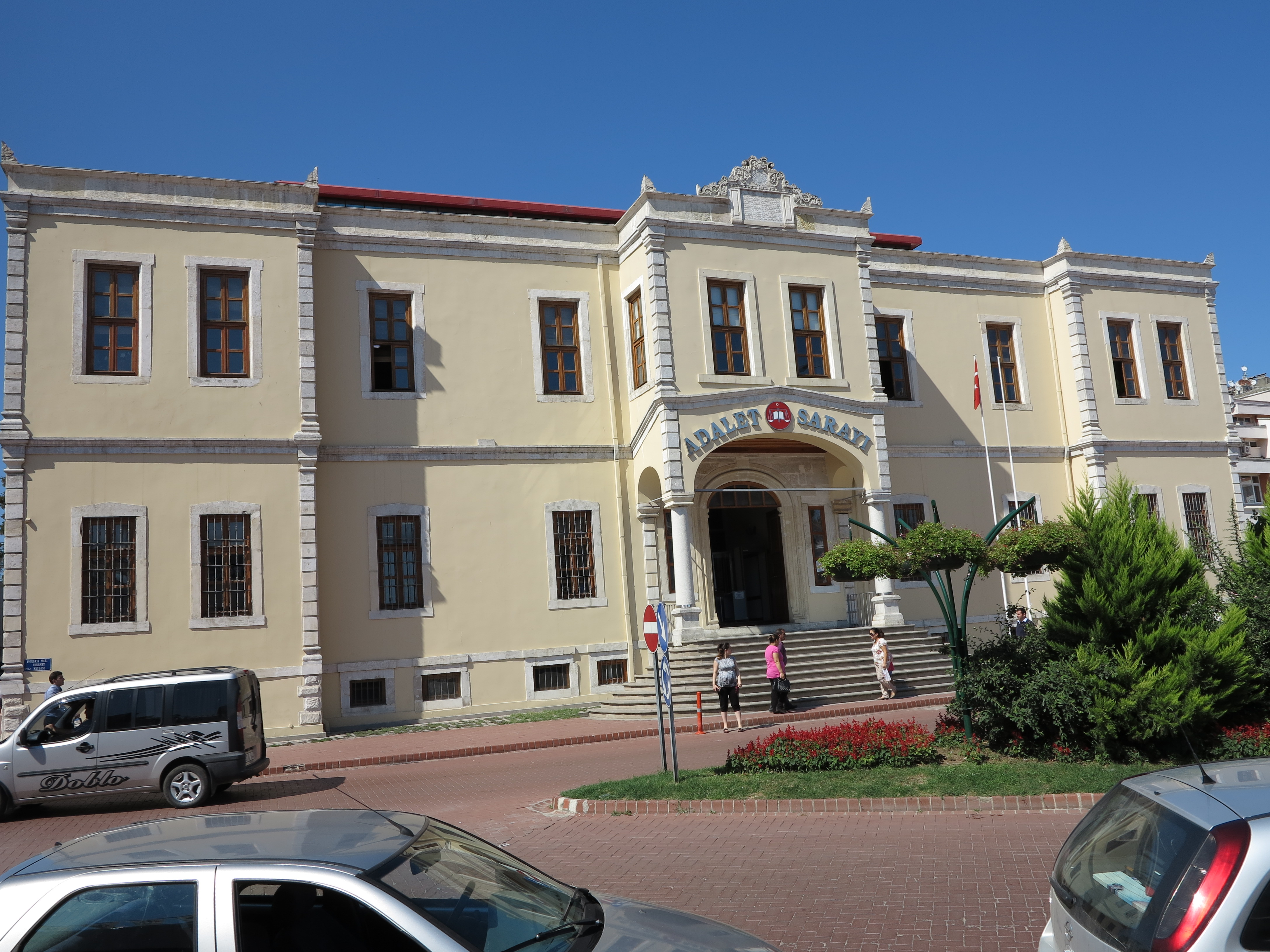 SINOP.ADALET SARAYI